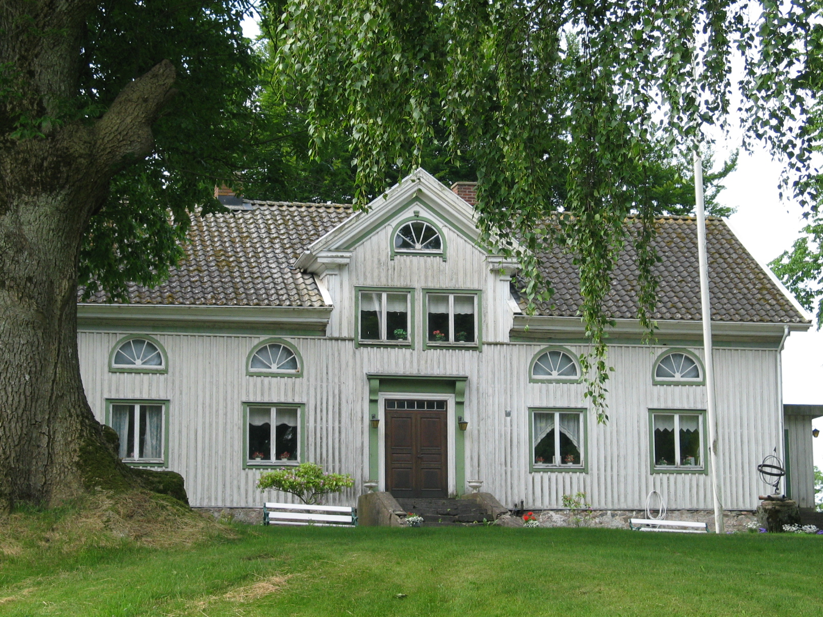 Lövås herrgård i Gestad, Dalsland